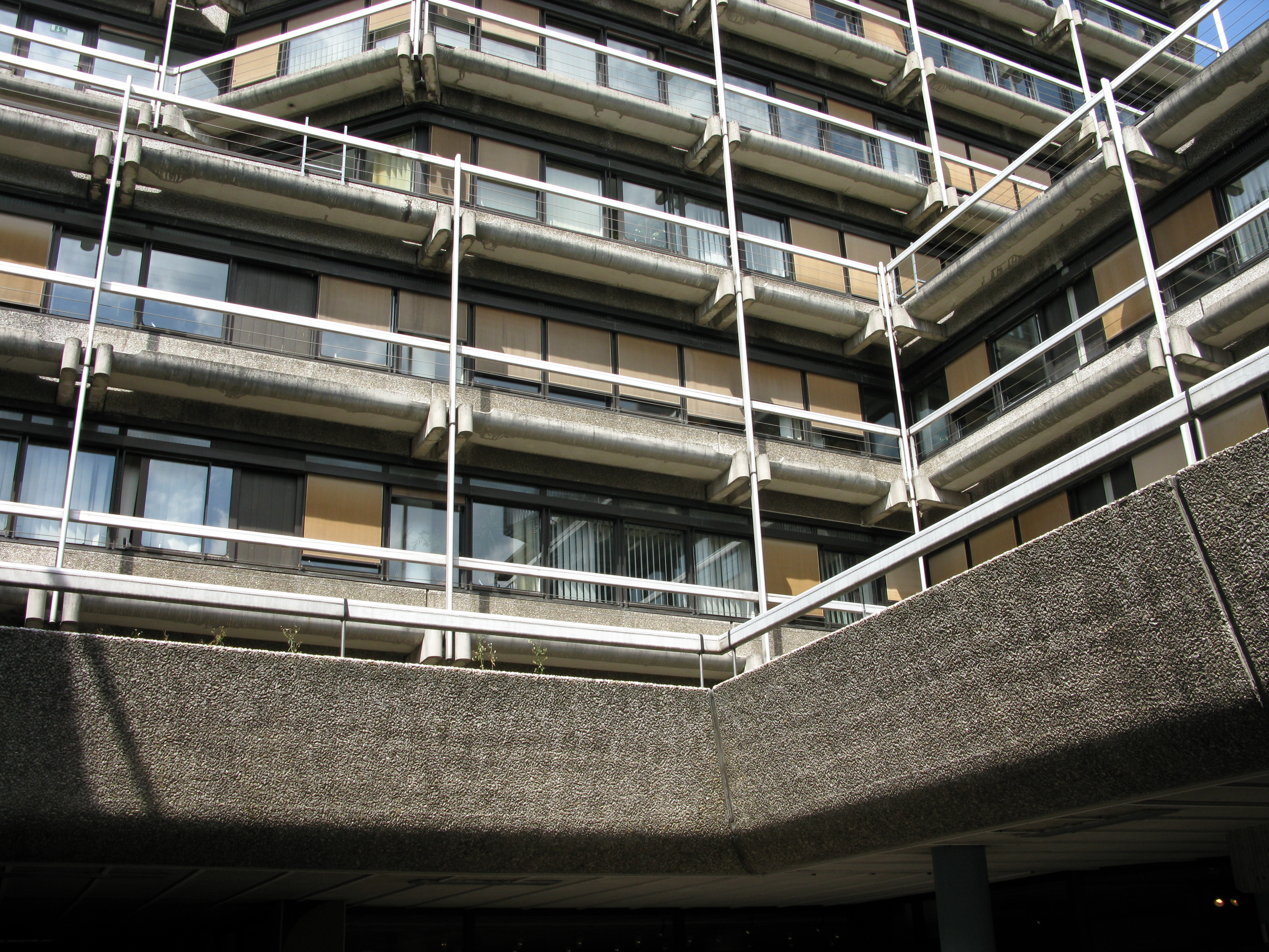 Fassade Südseite - Gitter aus Stangen eine Anlehung an Fachwerkbau